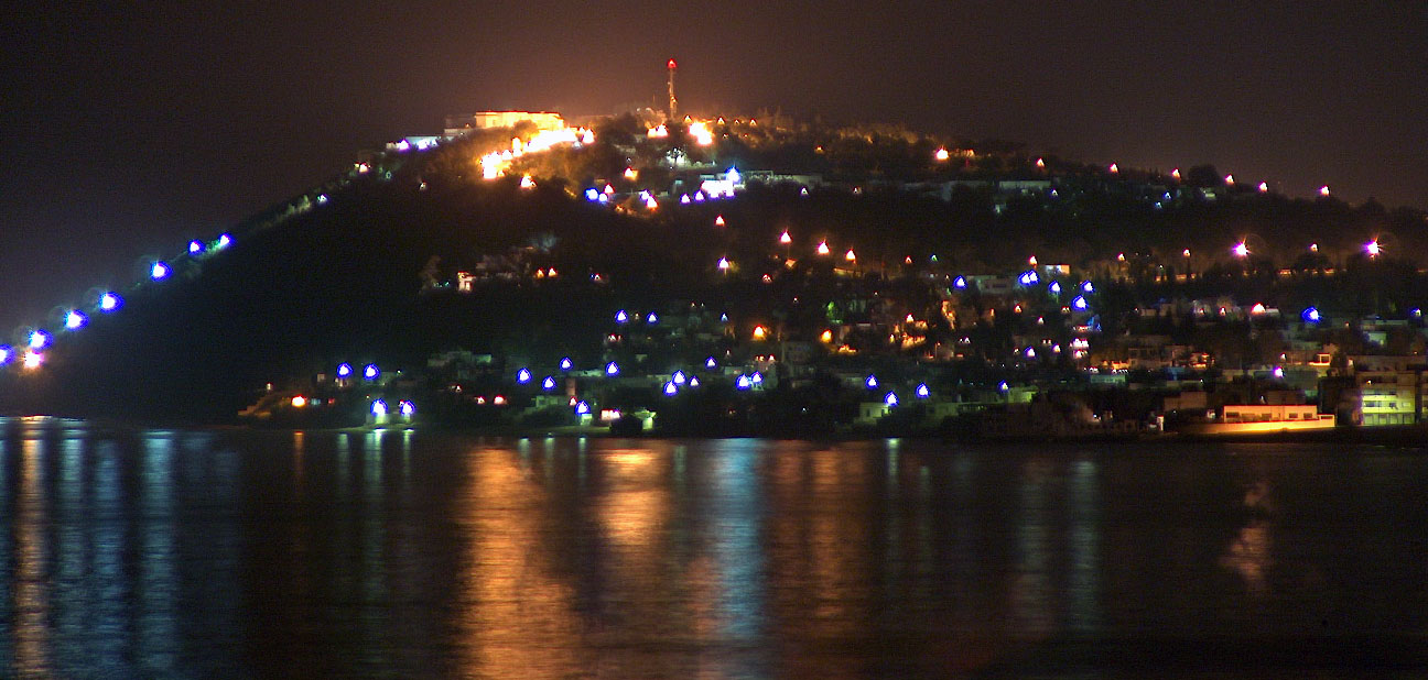 Banlieue nord de Tunis la nuit avec à gauche Sidi Bou Saïd et à droite La Marsa